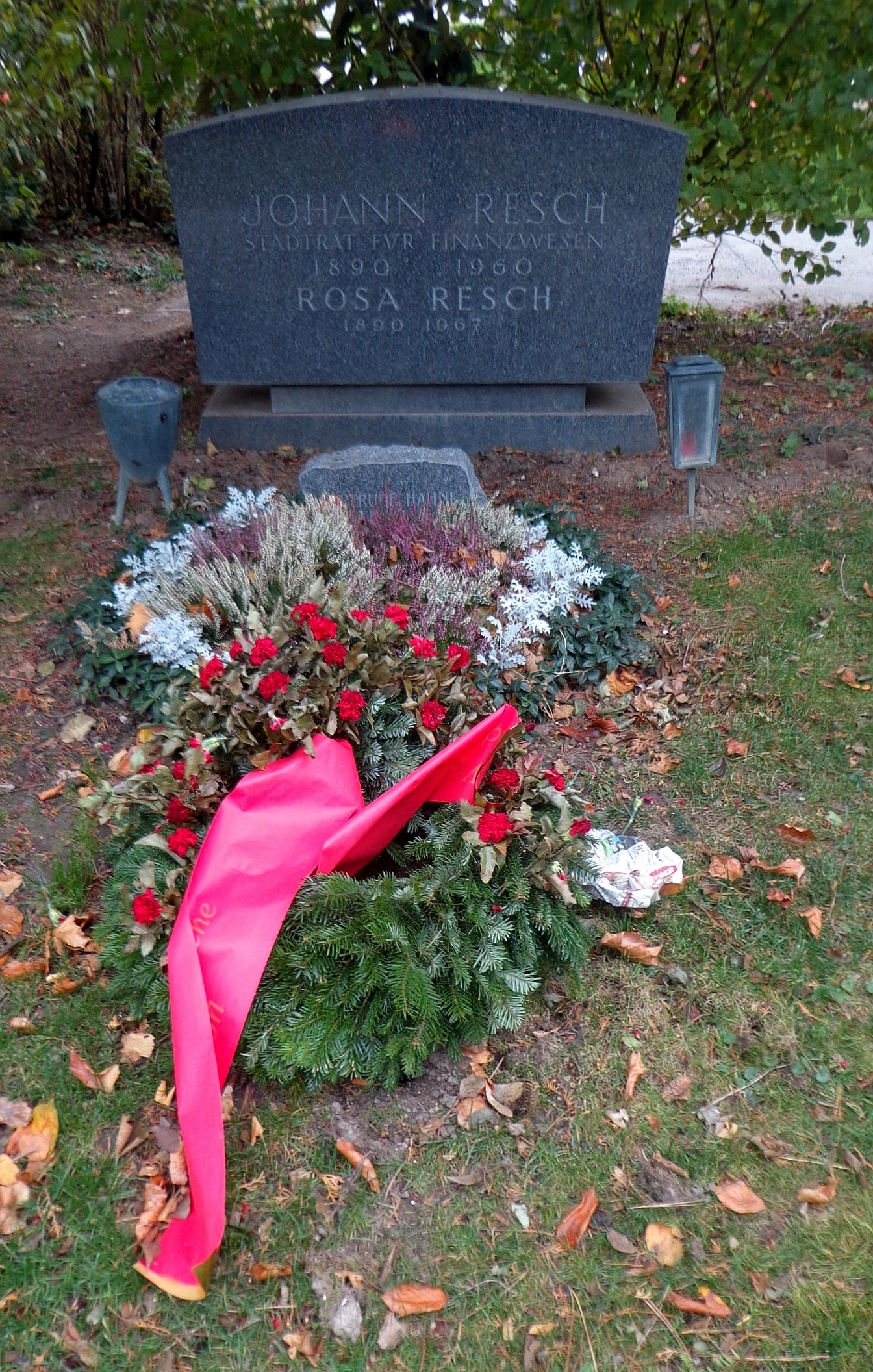 Wiener Zentralfriedhof - Gruppe 14 C, Ehrengrab von Johann Resch